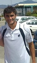 Jogador Hégon na Grécia.